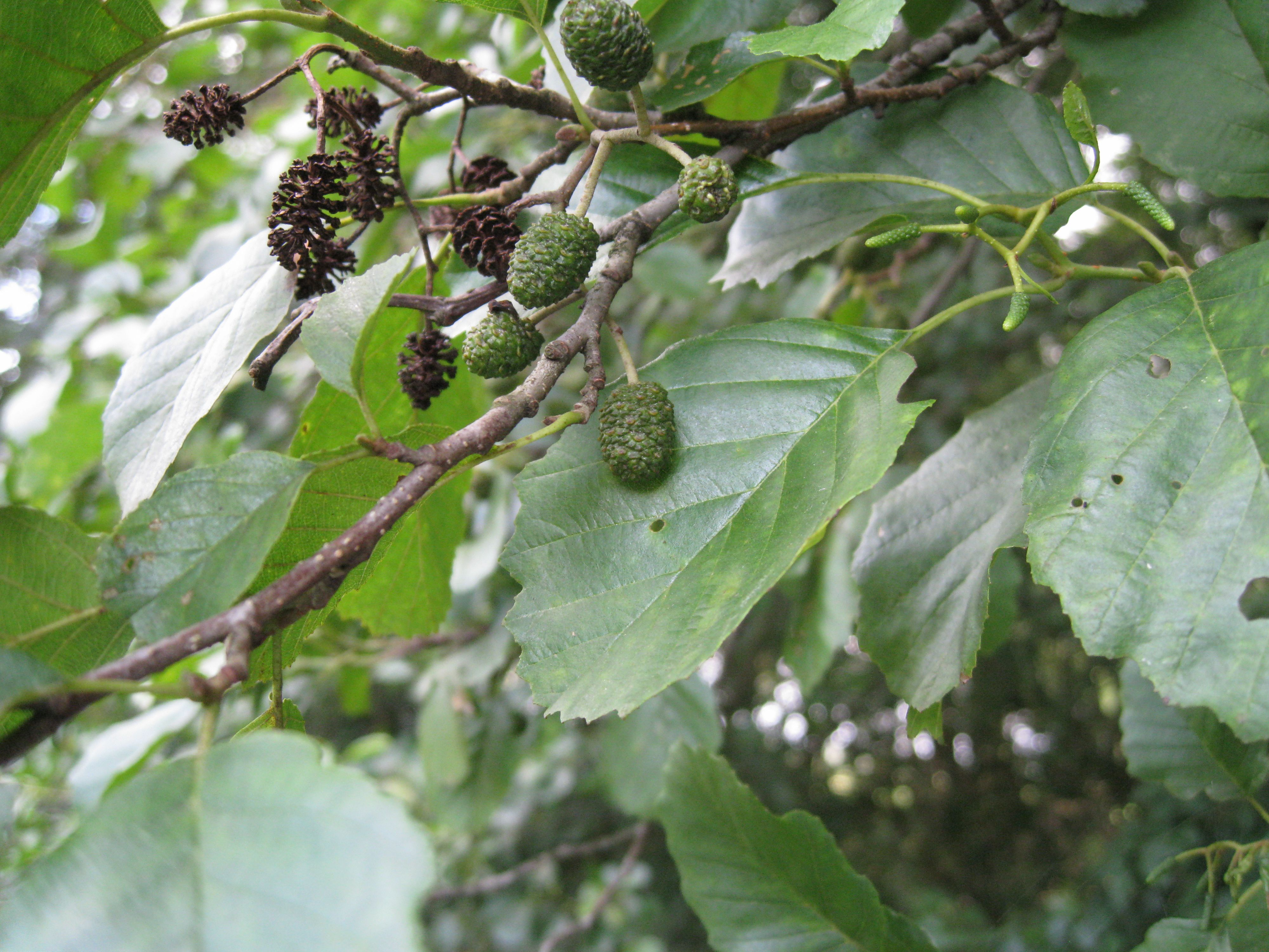 Erle in einem Erlenbruch bei Oldenburg. Weibliche und männliche Blütenstände